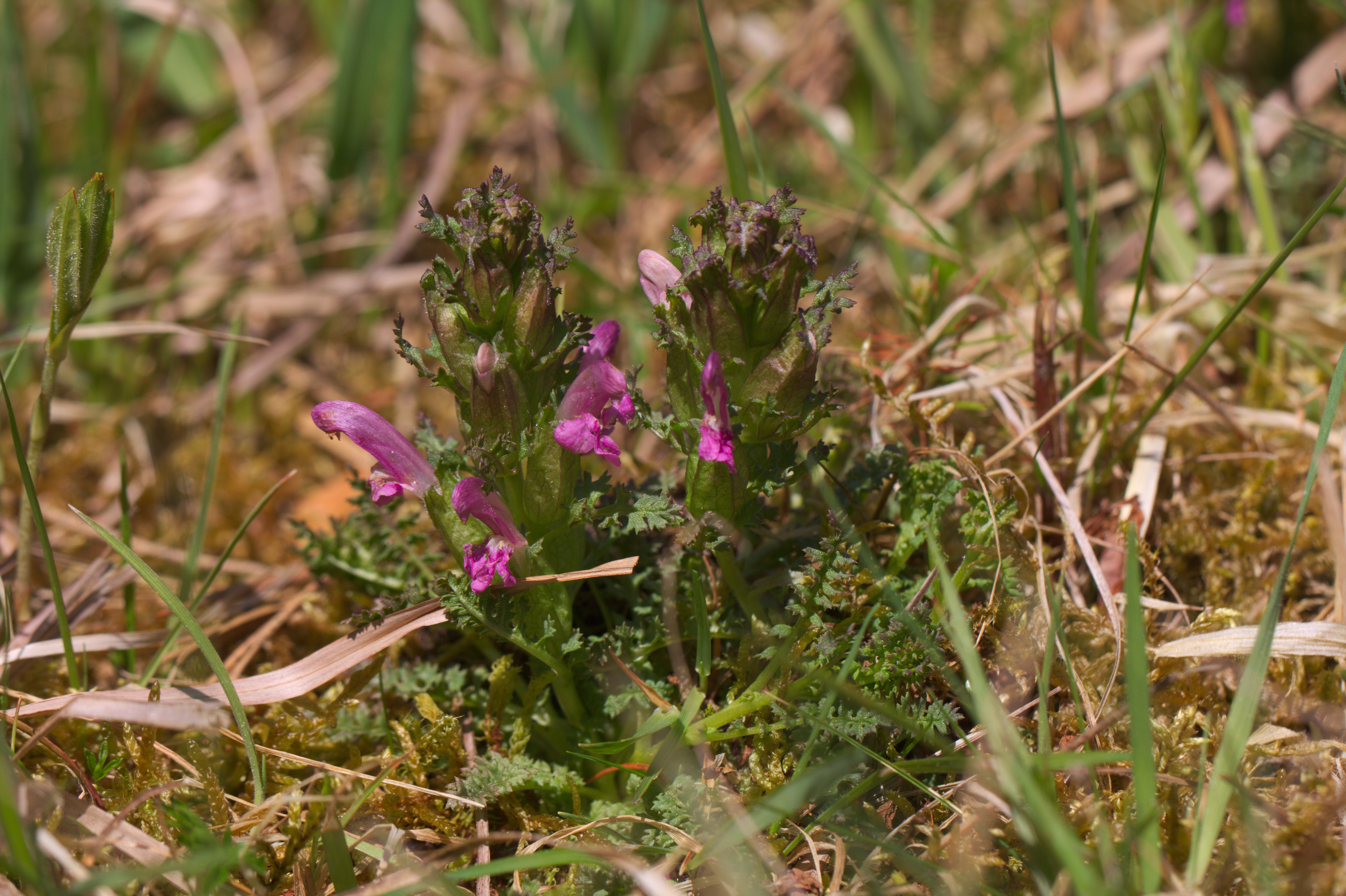 Zámek (přírodní památka) - Pedicularis sylvatica L., všivec lesní - status ohrožení v ČR: C3 (ohrožený)